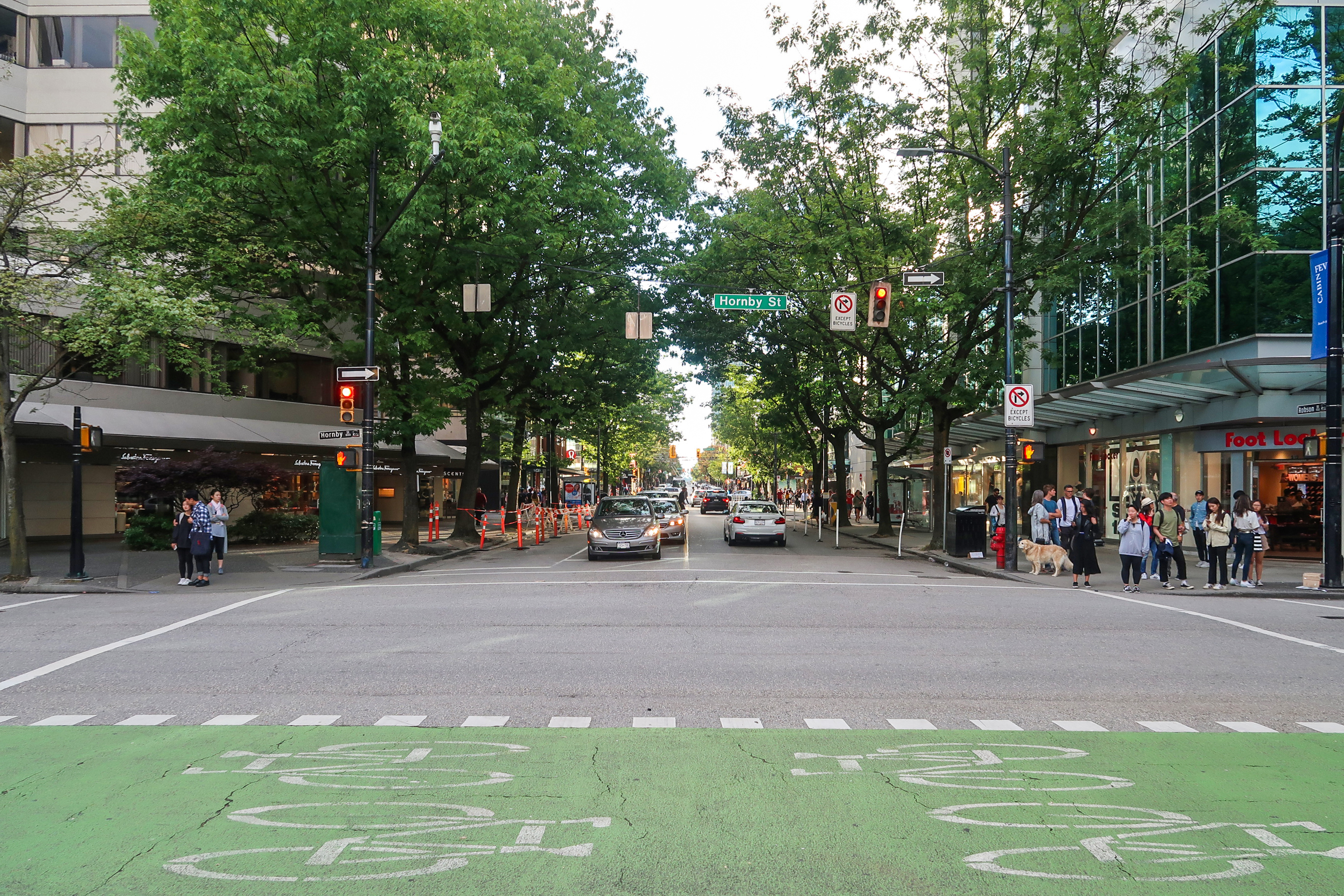 Robson Street, Vancouver